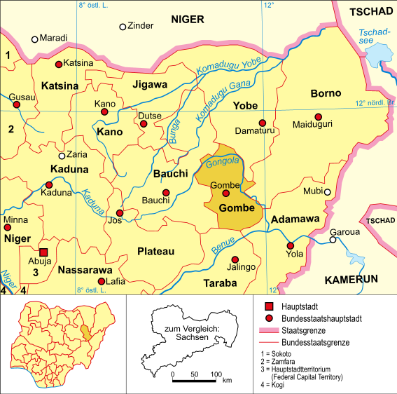 politische Karte Nigerias (Bundesstaat Gombe hervorgehoben)